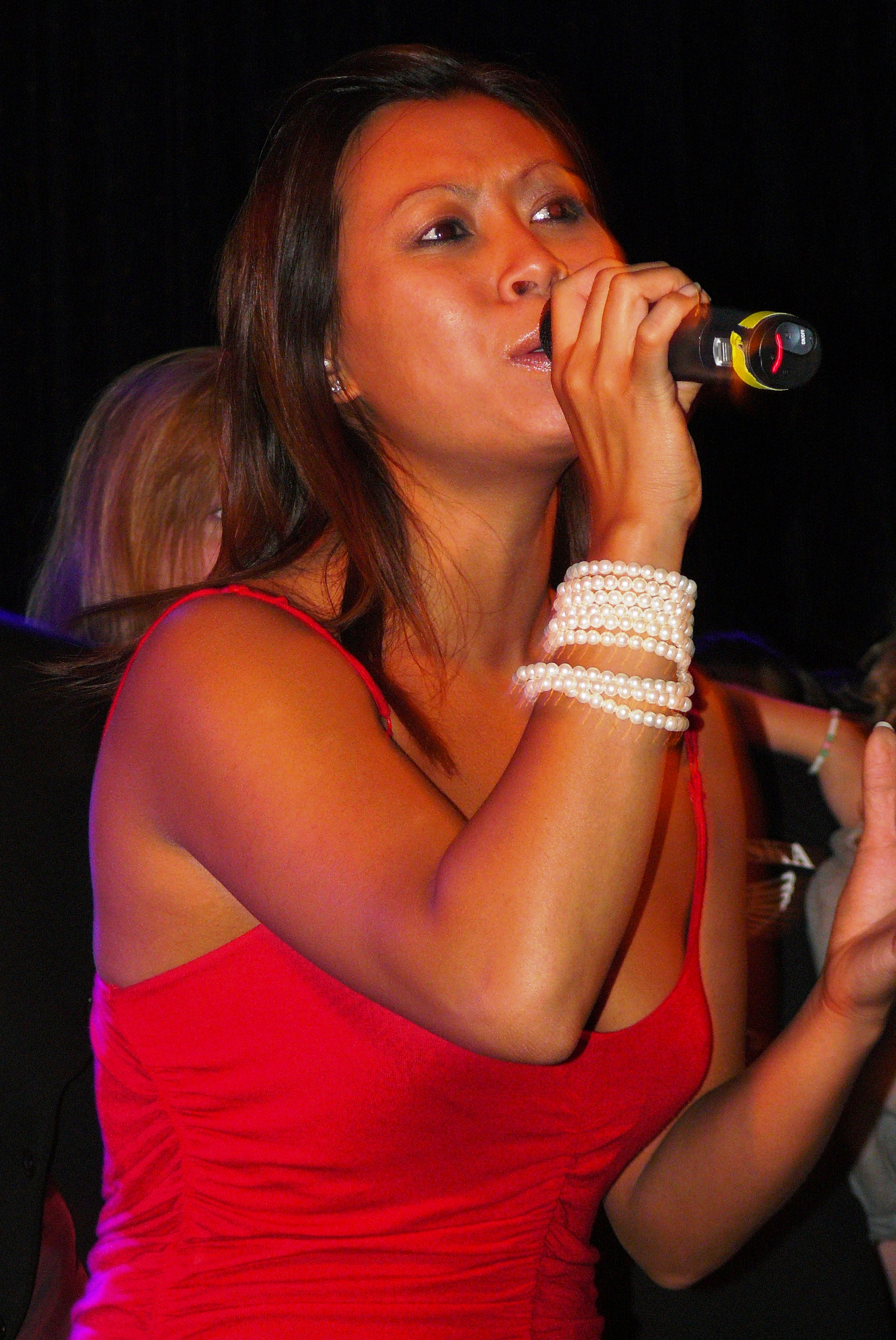 Phung Hang